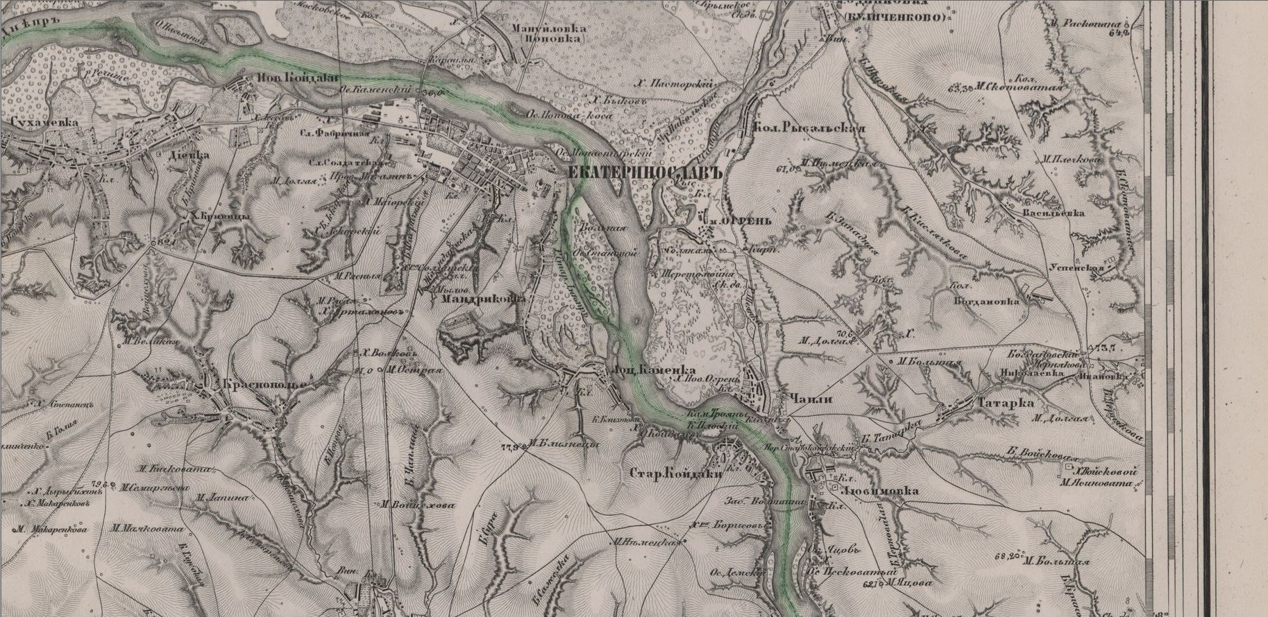 Фрагмент Военно-Топографической карты Екатеринославской губерніи 1861г. 3 вер. въ 1-мъ д. Зображено Єкатеринослав та його околиці.